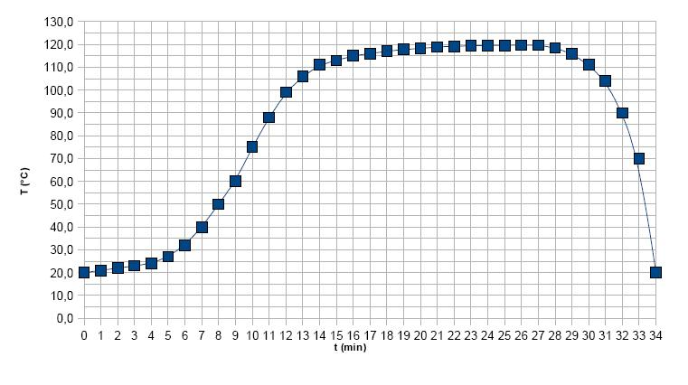 Grafico delle temperature raggiunte dal prodotto durante un ipotetici ciclo di sterilizzazione